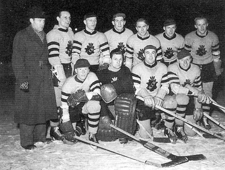 AIK Ice Hockey, Swedish champions 1947. Standing from left: Arne Granat, Hans Lenkert, Ruben Carlsson, Lars Ljungman, Åke Ström, Stig Jönsson, Klas Lindström. Sitting down: Tage Lindberg, Kurt Svanberg, Olle Andersson, Oscar Wester.